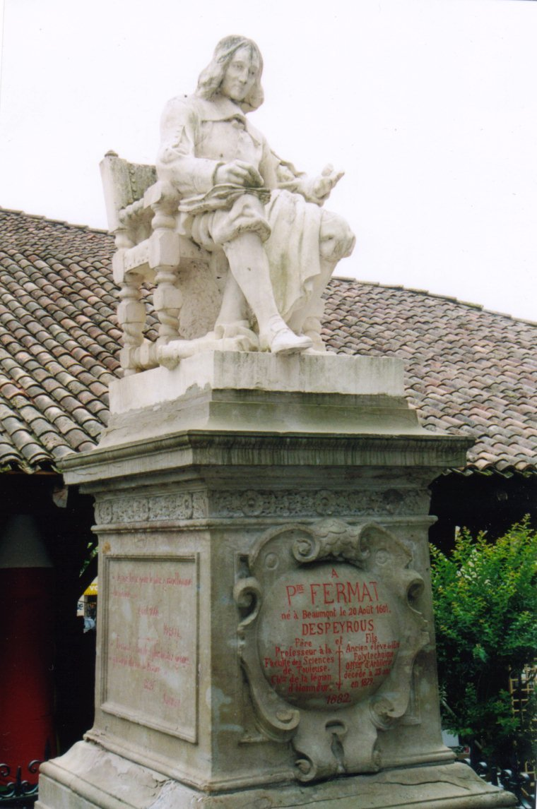 Piemineklis, kas veidots 1882.gadā 20.augustā. Jaunā bronzas statuja tika atklāta 2014.gada 14.maijā